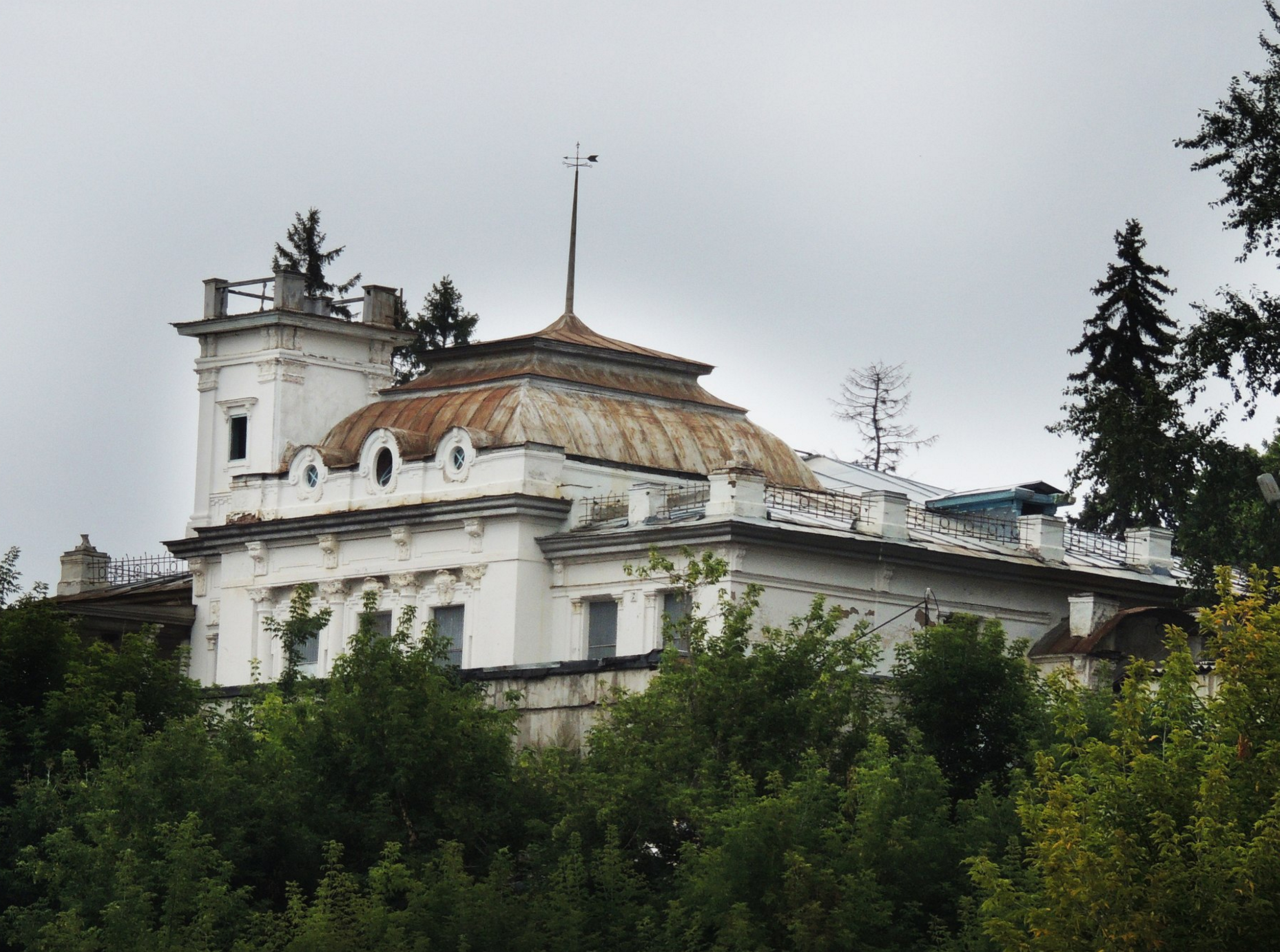 дом зятя И.Г. Стахеева В.В. Чикина